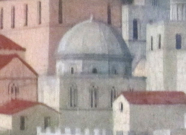 Museo di San Martino (Napoli), Chiesa di Santa Maria della Rotonda